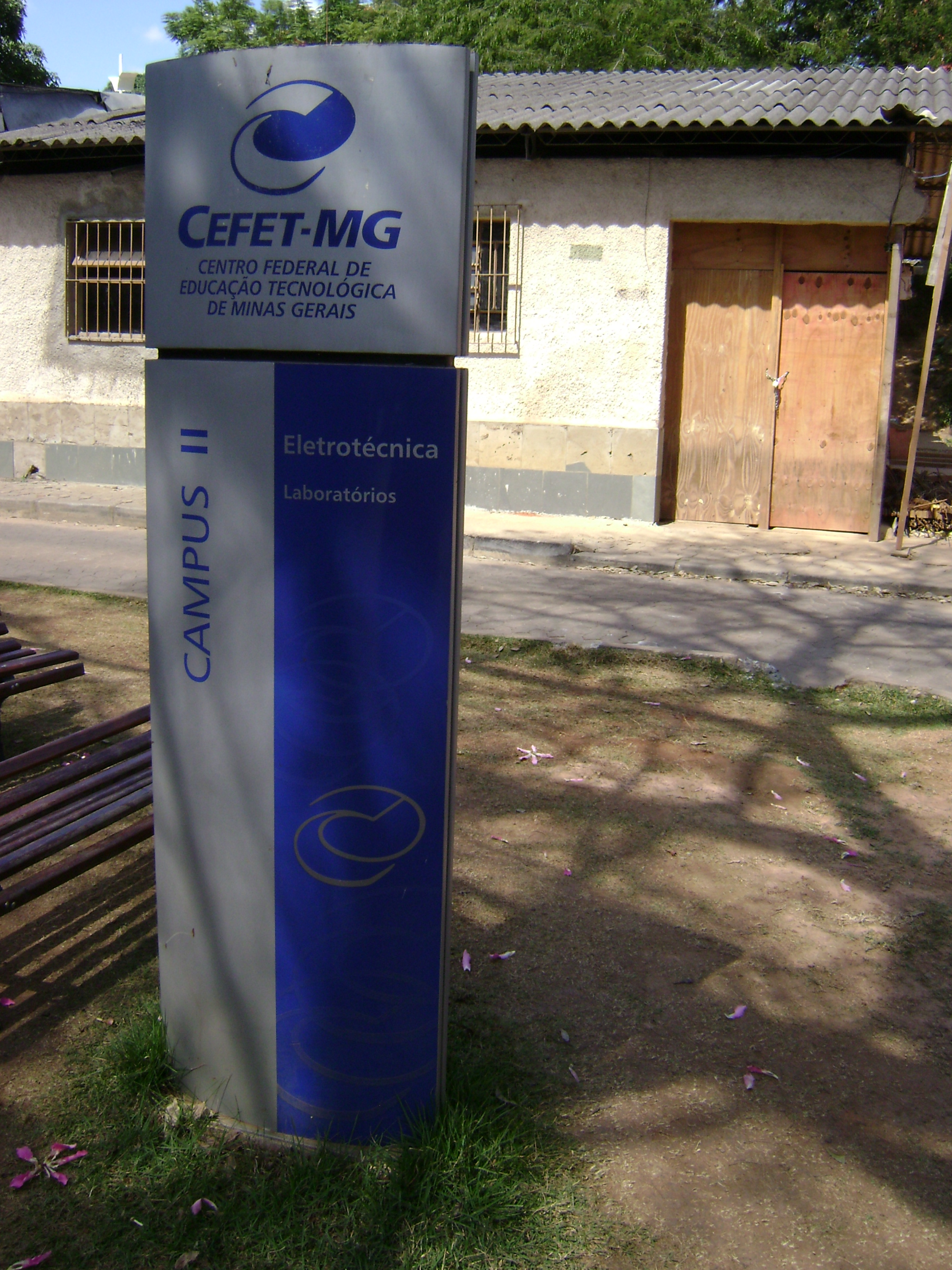 Placa sinalizando os laboratórios de eletrotécnica do campus II do Cefet-MG, em Belo Horizonte, Brasil.